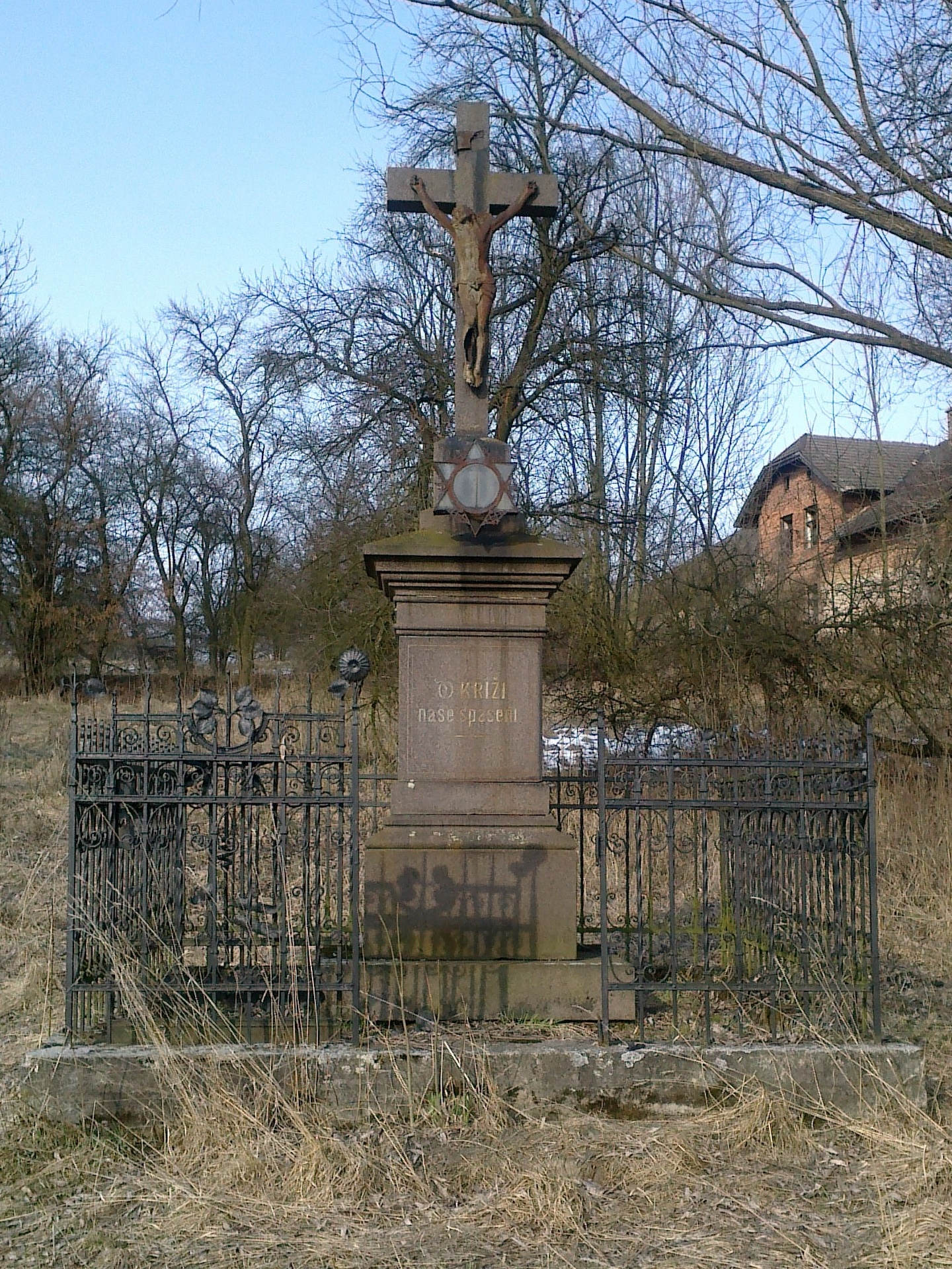 Provoz u Dobrušky - krucifix